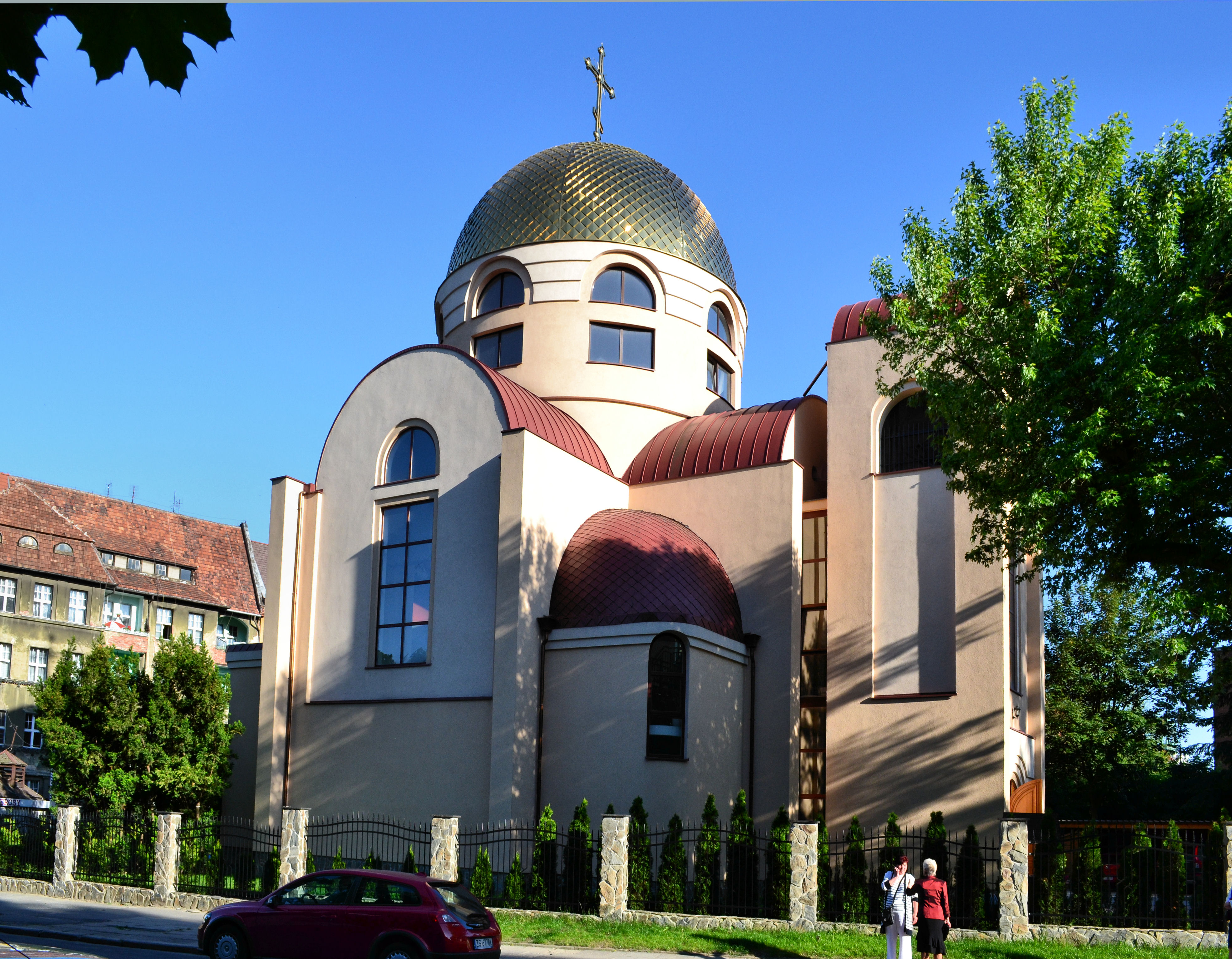 Cerkiew św. Mikołaja w Szczecinie